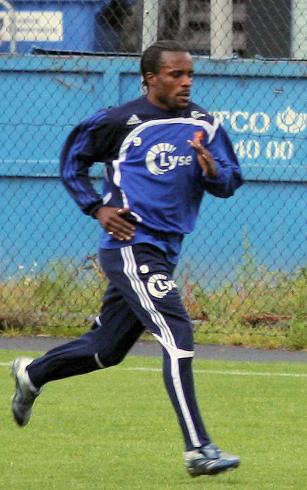 Peter Ijeh soccer player for Viking, Stavanger